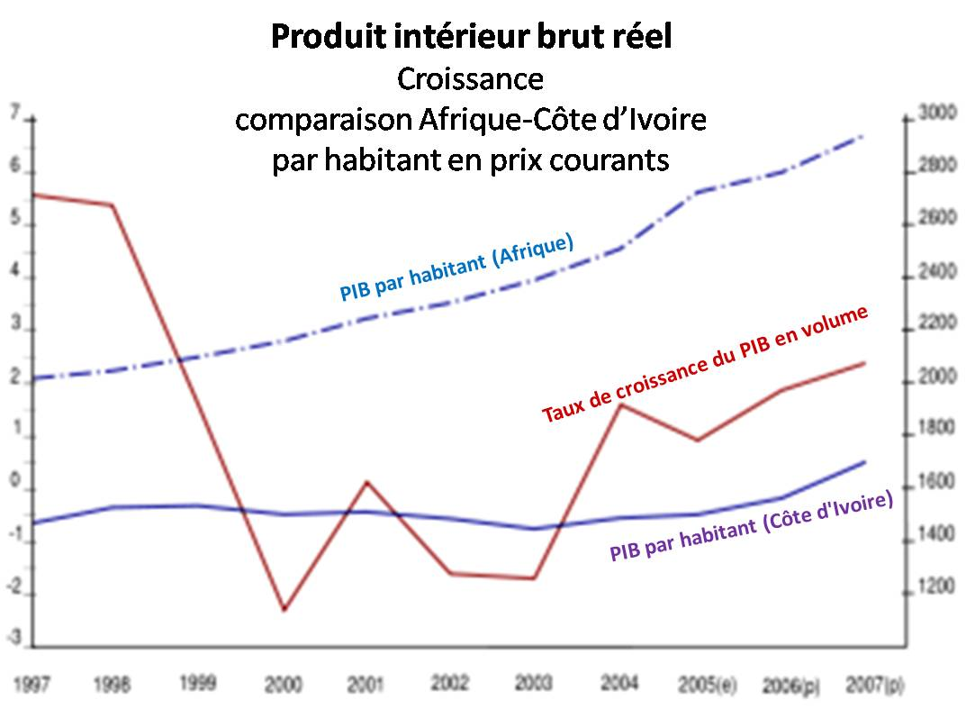 Produit intérieur brut de la Côte d'Ivoire (croissance et importance) d'après les données OCDE retranscrites par Ewan ar Born dans l'image Image:GDP growth importance Côte d Ivoire-fr.svg